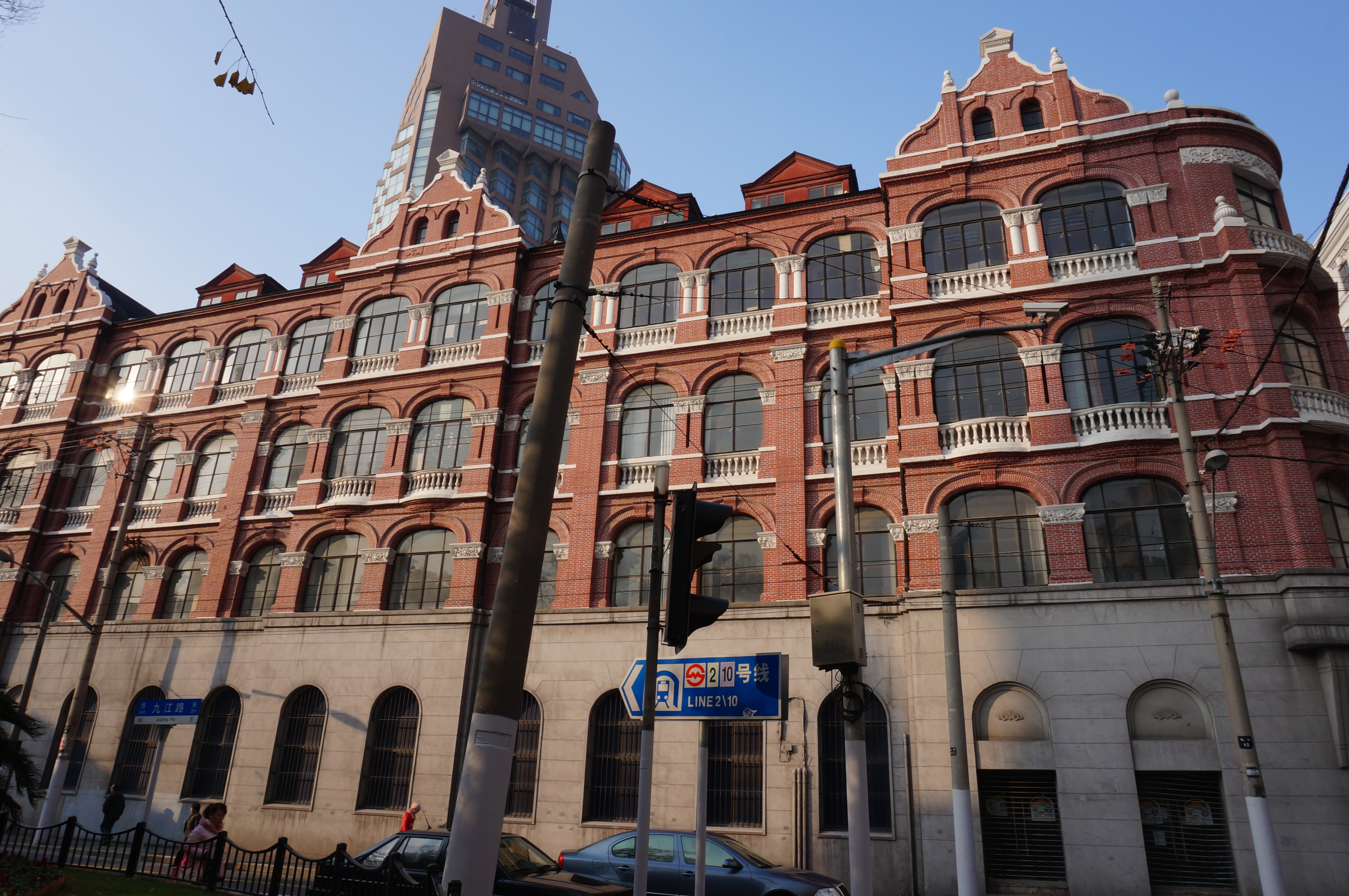 中文（中国大陆）: 上海礼和洋行大楼